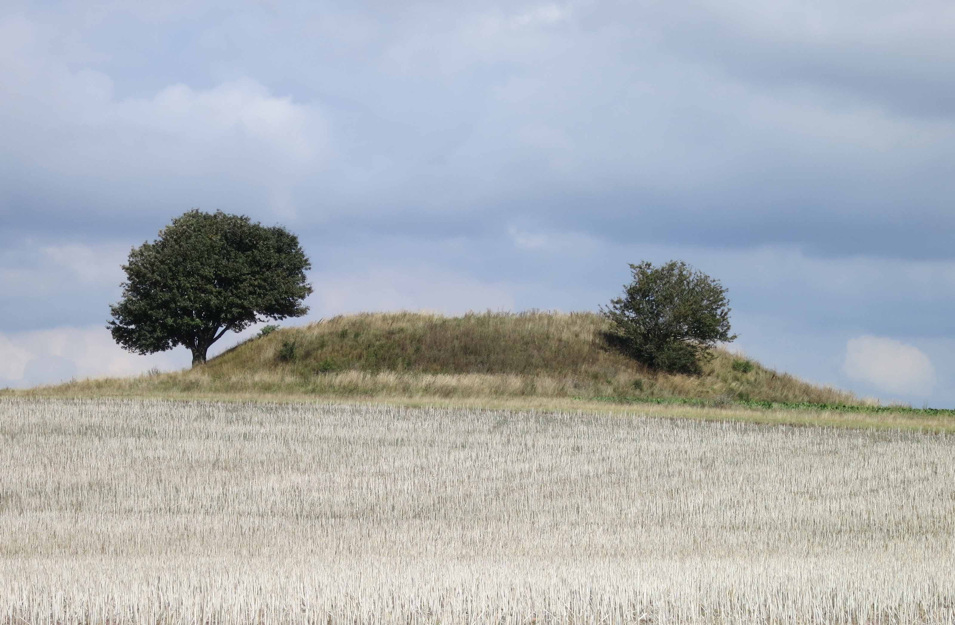 Gravhögen Vållehög i Södra Åkarps socken, Vellinge kommun